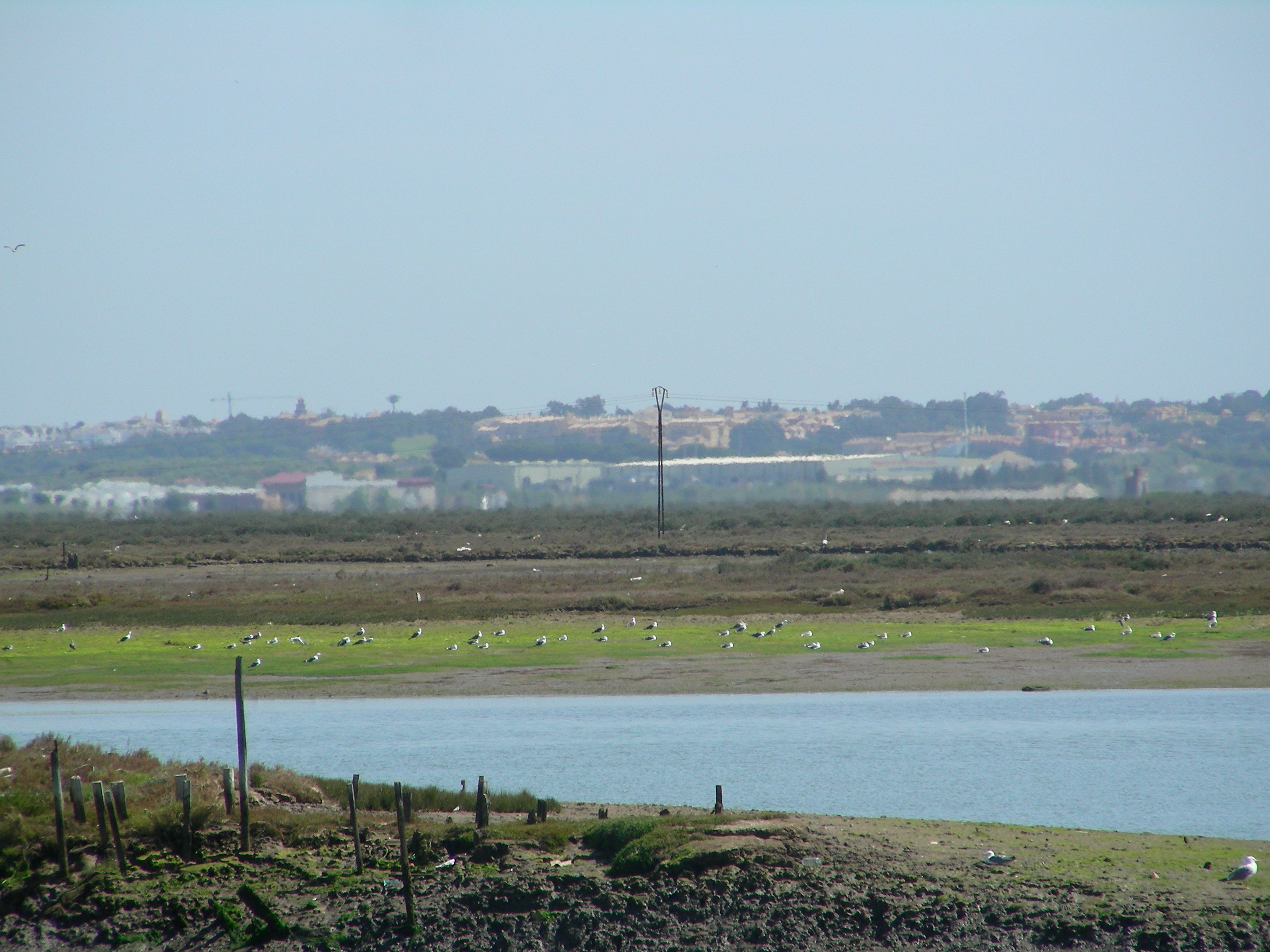 vista general PN marismas de Isla Cristina